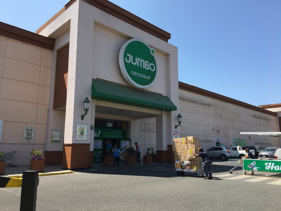 Jumbo Talca